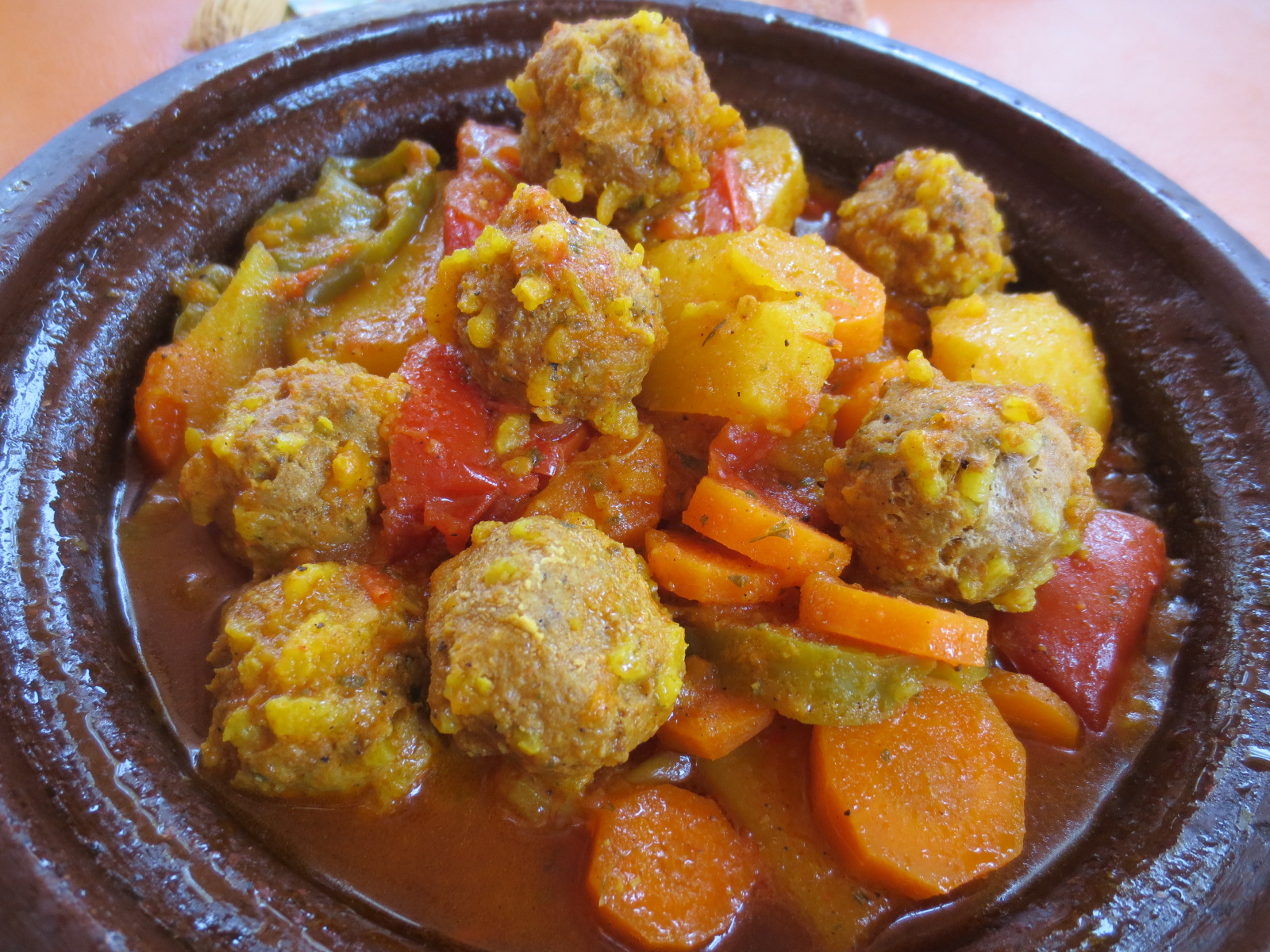 Tajine